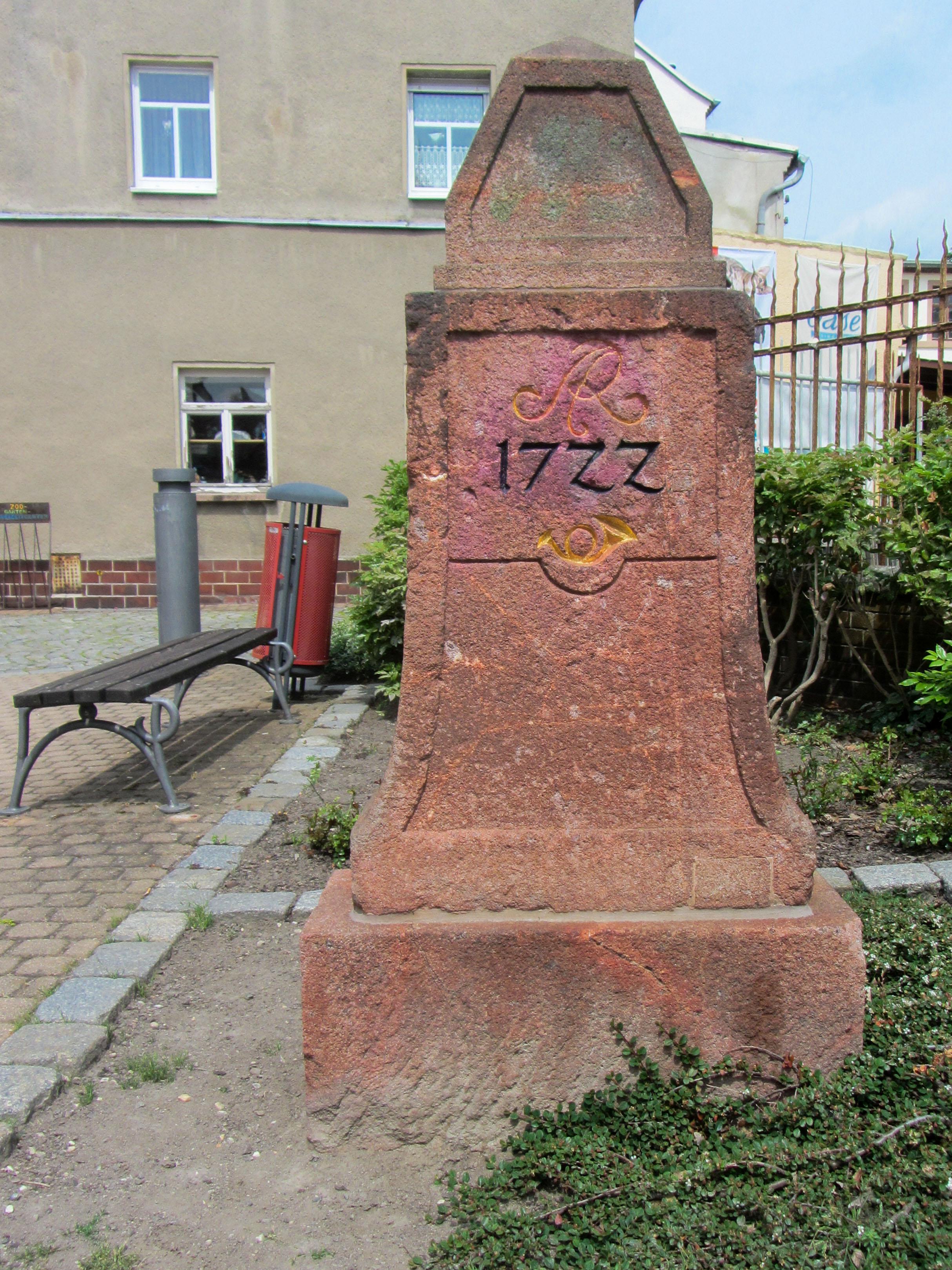 Kursächsischer Viertelmeilenstein Nr. 39, Straße der Einheit in Bad Lausick Text: AR 1722 Posthorn ; 39